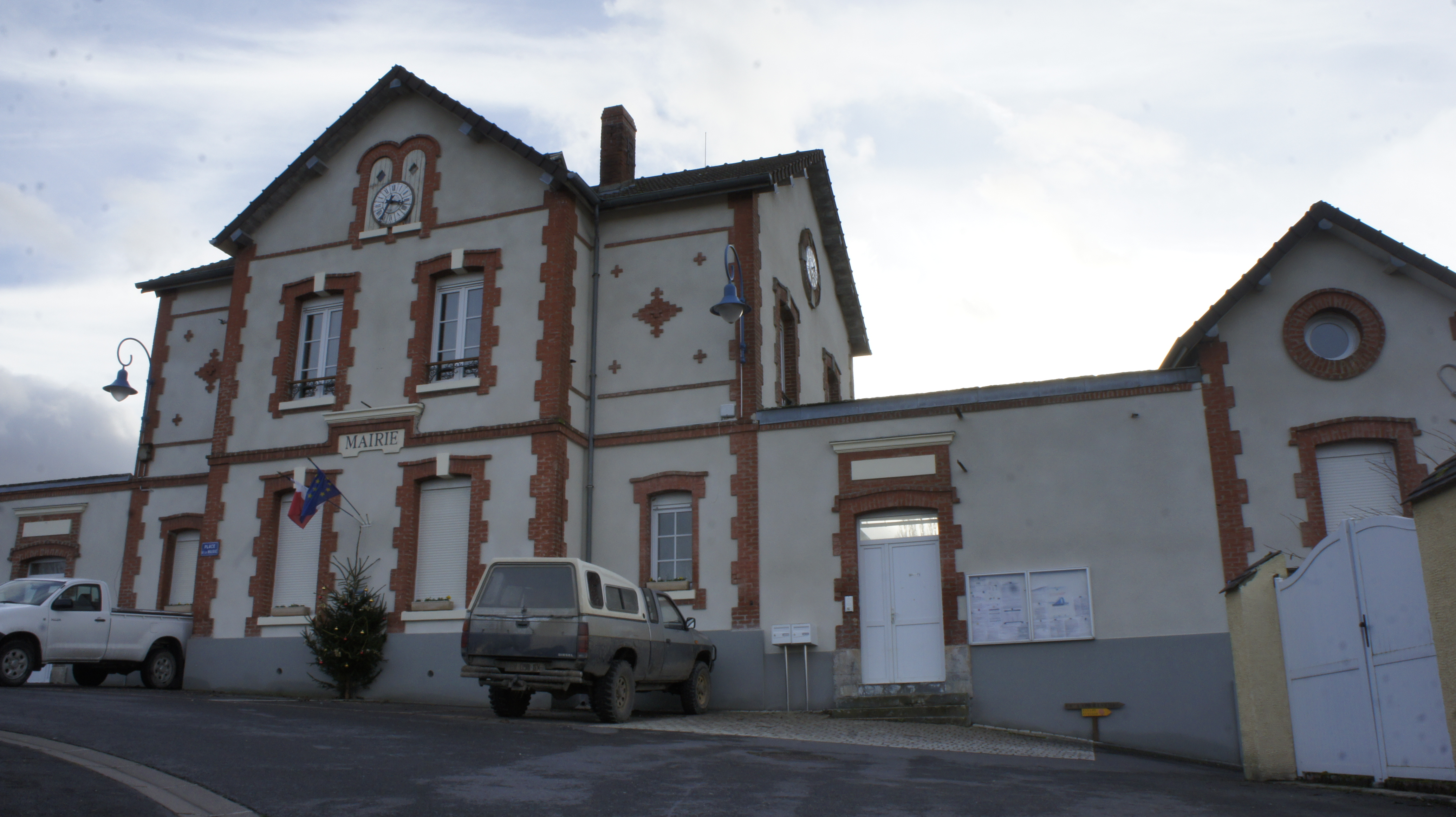 Vue sur la mairie de Nanteuil .